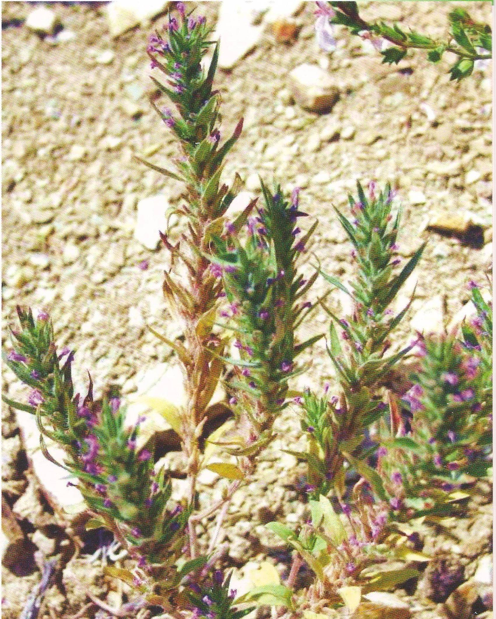 Kiçikdağ dağ nanəsi